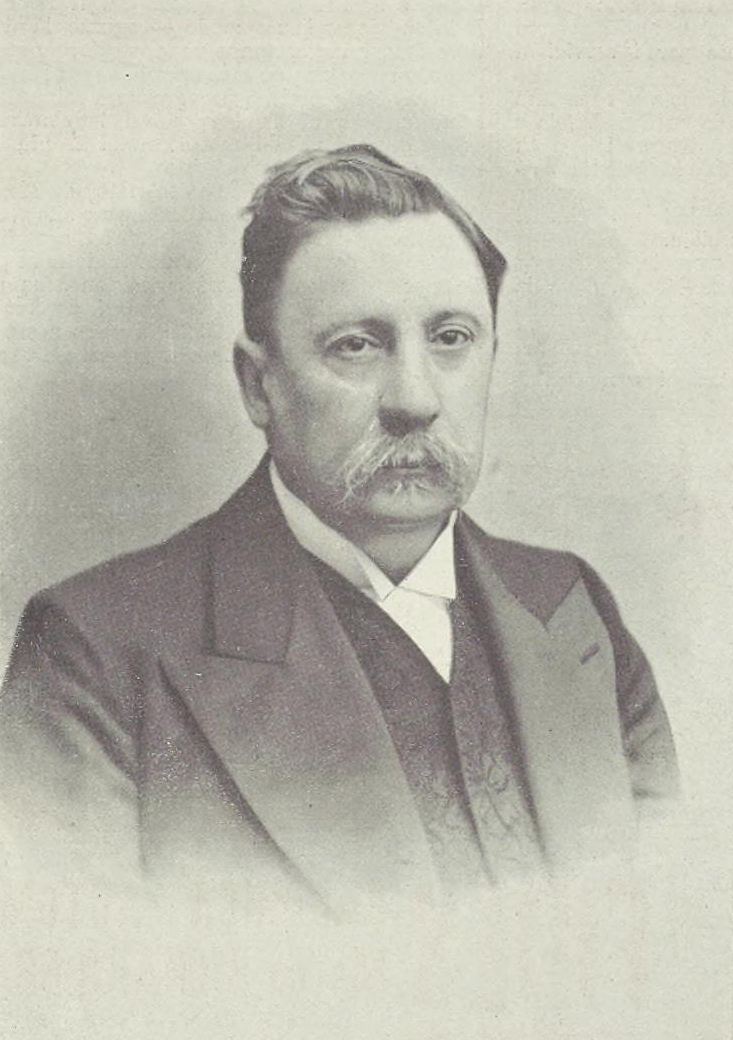 Prof. Luigi Mangiagalli (1850-1928)